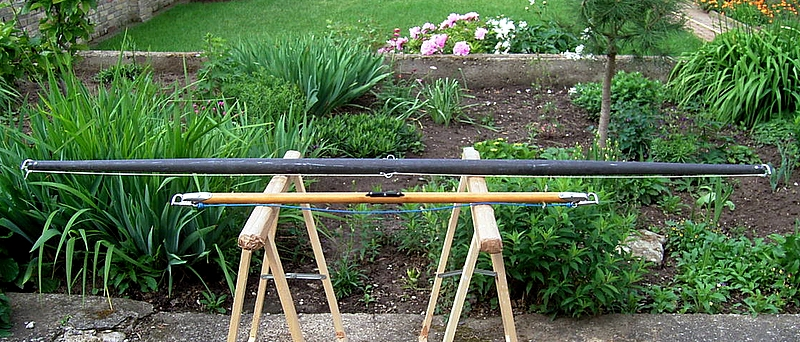 Spibäume einer Piaf (vorne, Holz) und einer Fam (hinten, Alu)